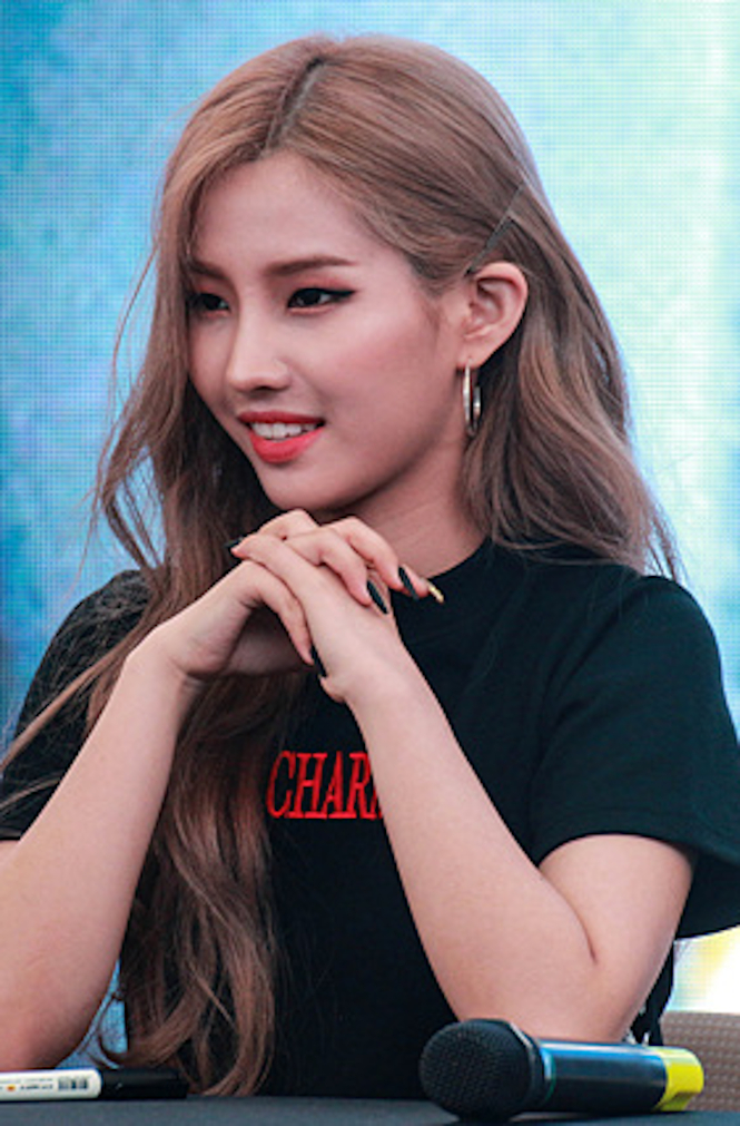 6월 2일 (여자)아이들 팬사인회